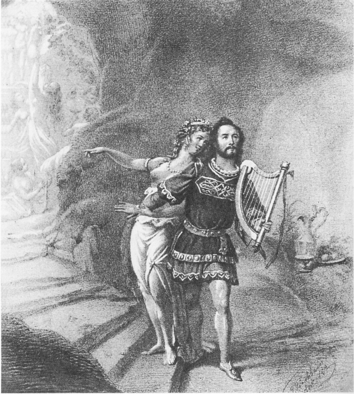 Uraufführung von Richard Wagners "Tannhäuser" am 19. Oktober 1845. Joseph Tichatschek als Tannhäuser und Wilhelmine Schröder-Devrient als Venus.